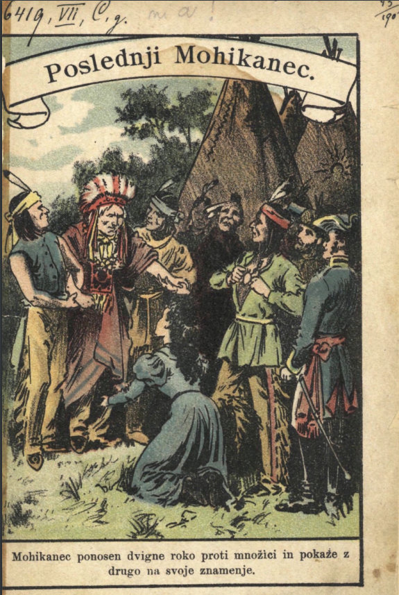 Natanael Bumppo: Poslednji Mohikanec, 1900